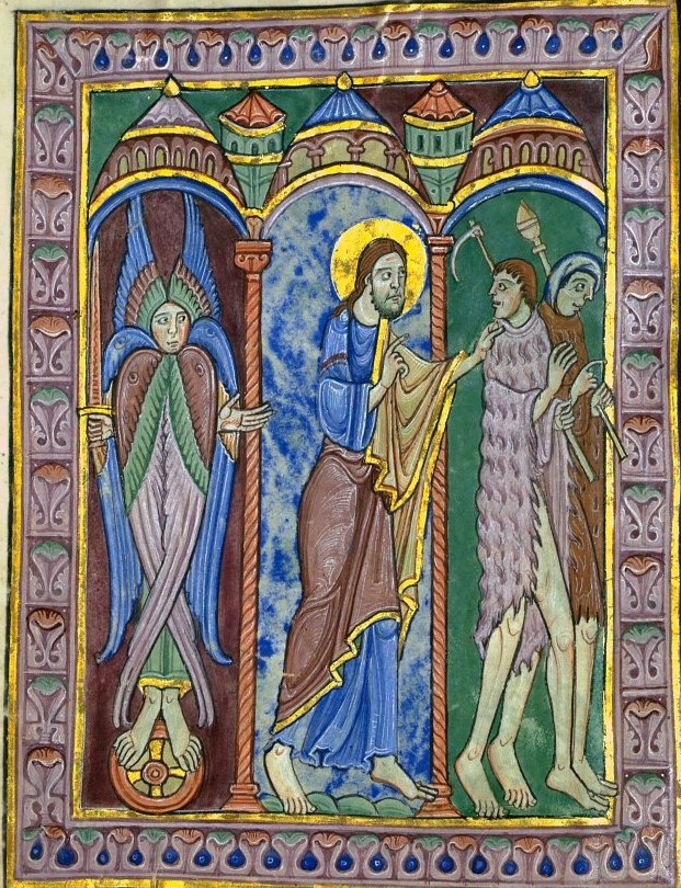 Albani-Psalter: Ausweisung aus dem Paradies